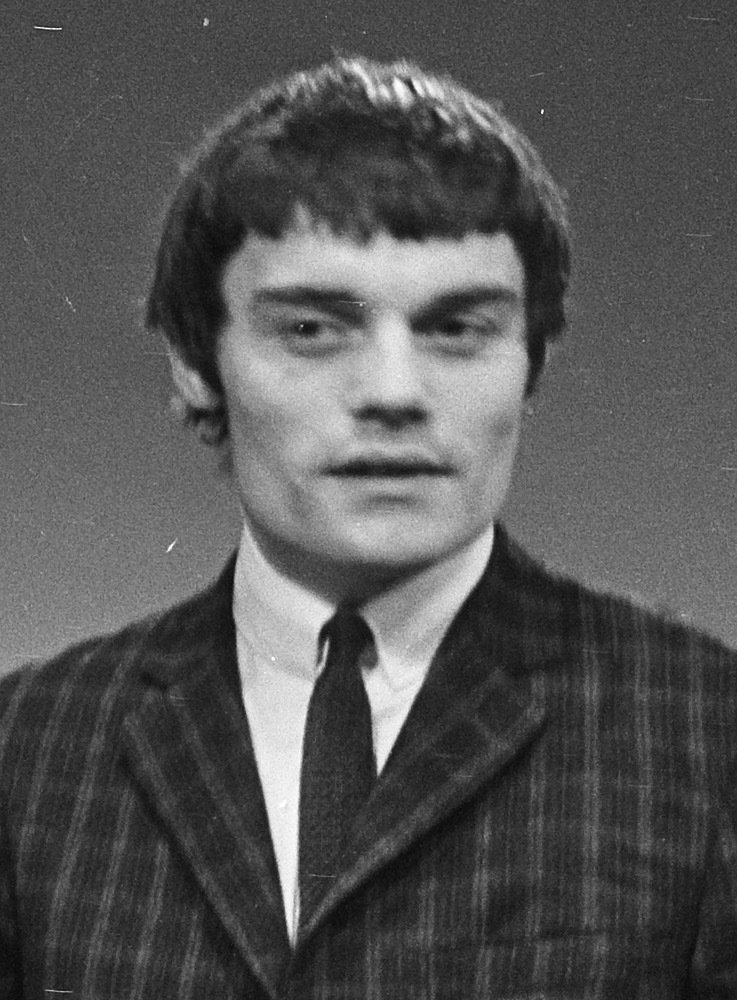 Collectie / Archief : Fotocollectie Anefo Reportage / Serie : [ onbekend ] Beschrijving : Televisie-optreden van The Beatles in Treslong te Hillegom [vlnr. George Harrison, Paul McCartney, John Lennon, Jimmie Nicol (vervanger van Ringo Starr] Datum : 5 juni 1964 Locatie : Hillegom Trefwoorden : groepsportretten, popgroepen, televisie Instellingsnaam : Beatles, The Fotograaf : Koch, Eric / Anefo Auteursrechthebbende : Nationaal Archief Materiaalsoort : Negatief (zwart/wit) Nummer archiefinventaris : bekijk toegang 2.24.01.05 Bestanddeelnummer : 916-5098